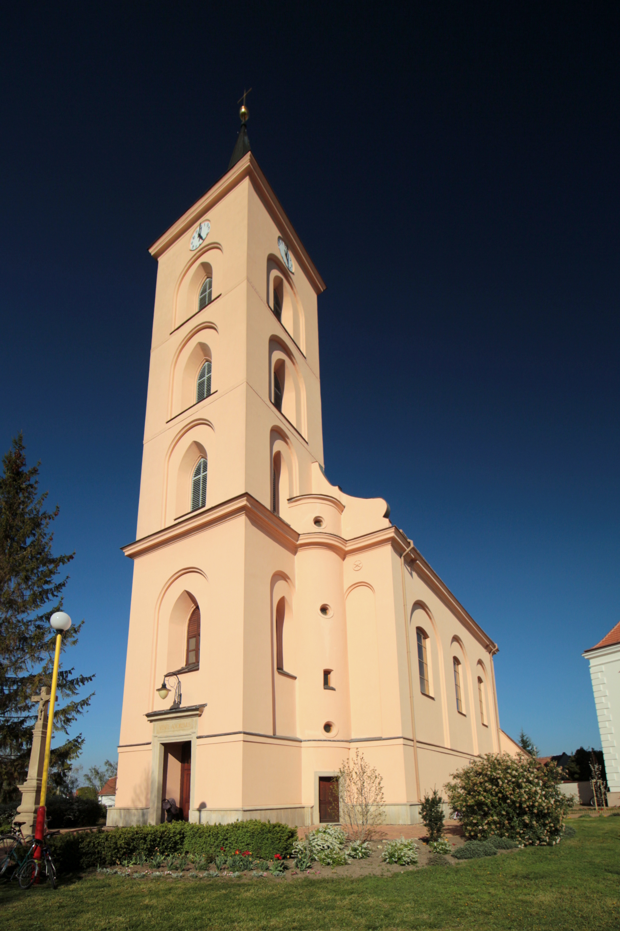 Velké Bílovice, Žerotínovo náměstí